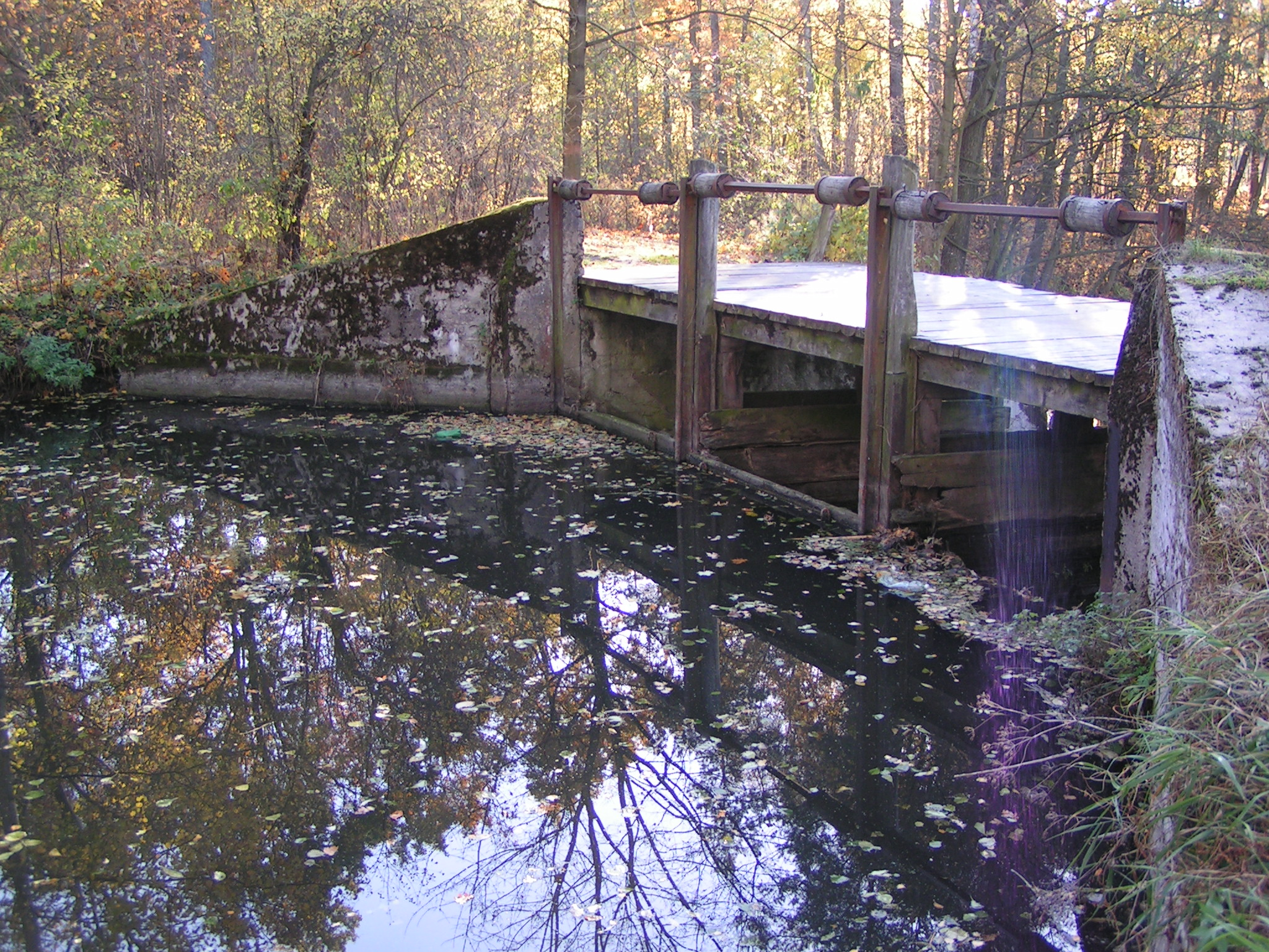 Ruda, tama na rz. Mieni - część systemu melioracyjnego Starzeńskich